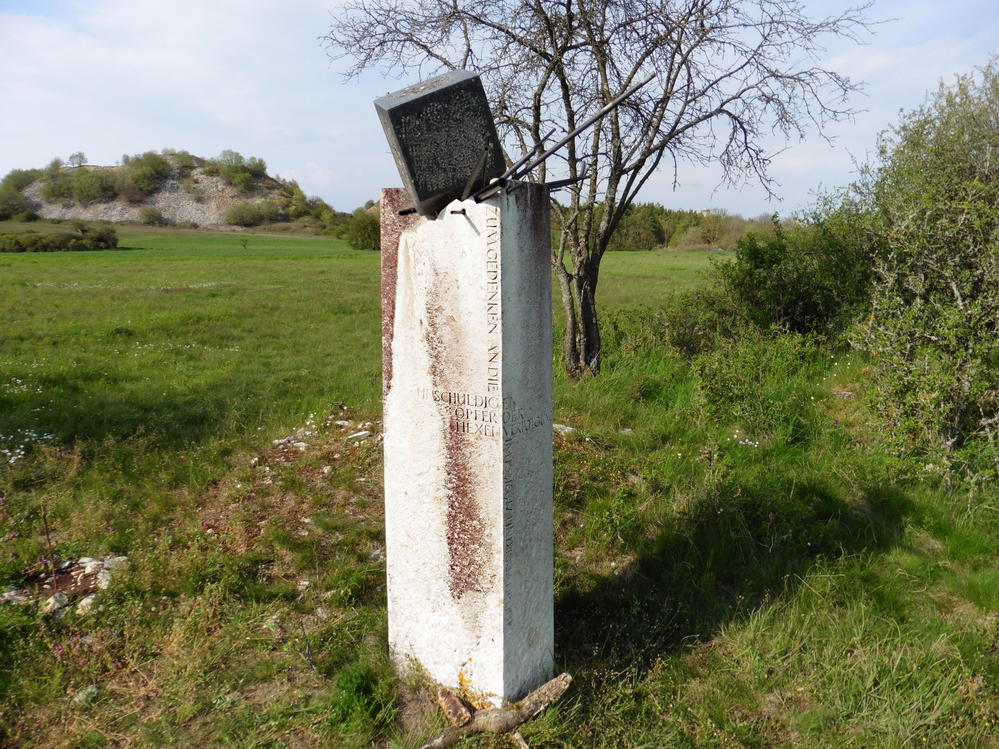 Mahnmal des Eichstätter Bildhauers Rupert Fieger für die Opfer der Hexenverfolgung im Hochstift Eichstätt an der Hinrichtungsstätte auf dem Hochgericht am ehemaligen Galgenberg, errichtet 2001. Material: Jurakalkstein, Granit, Metallrohre. Ansicht von Süden. Inschrift: “Zum Gedenken an die unschuldigen Opfer der Hexenverfolgung im 15., 16., 17. und 18. Jahrhundert.”